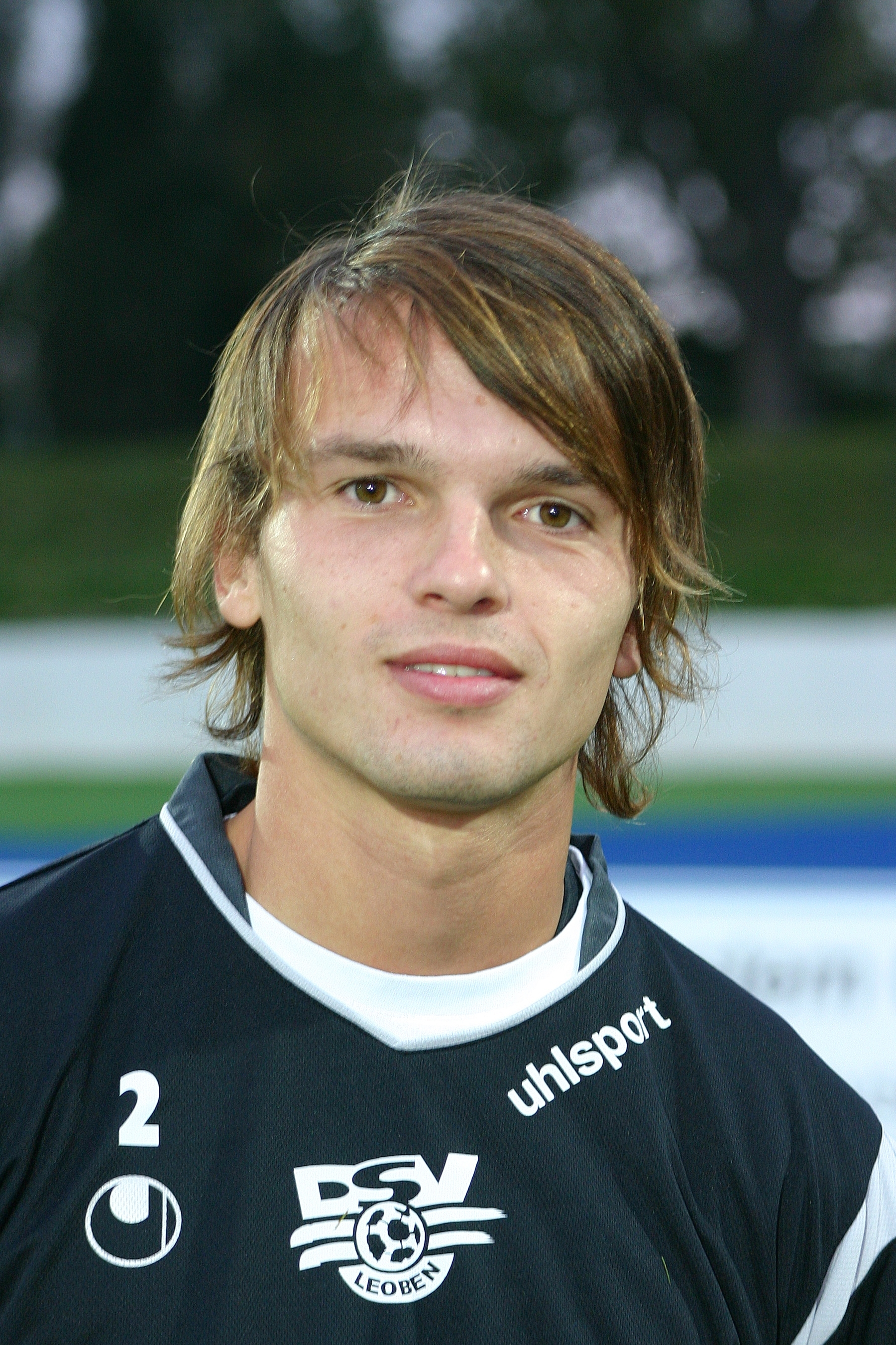 Martin Petkov (DSV Leoben)